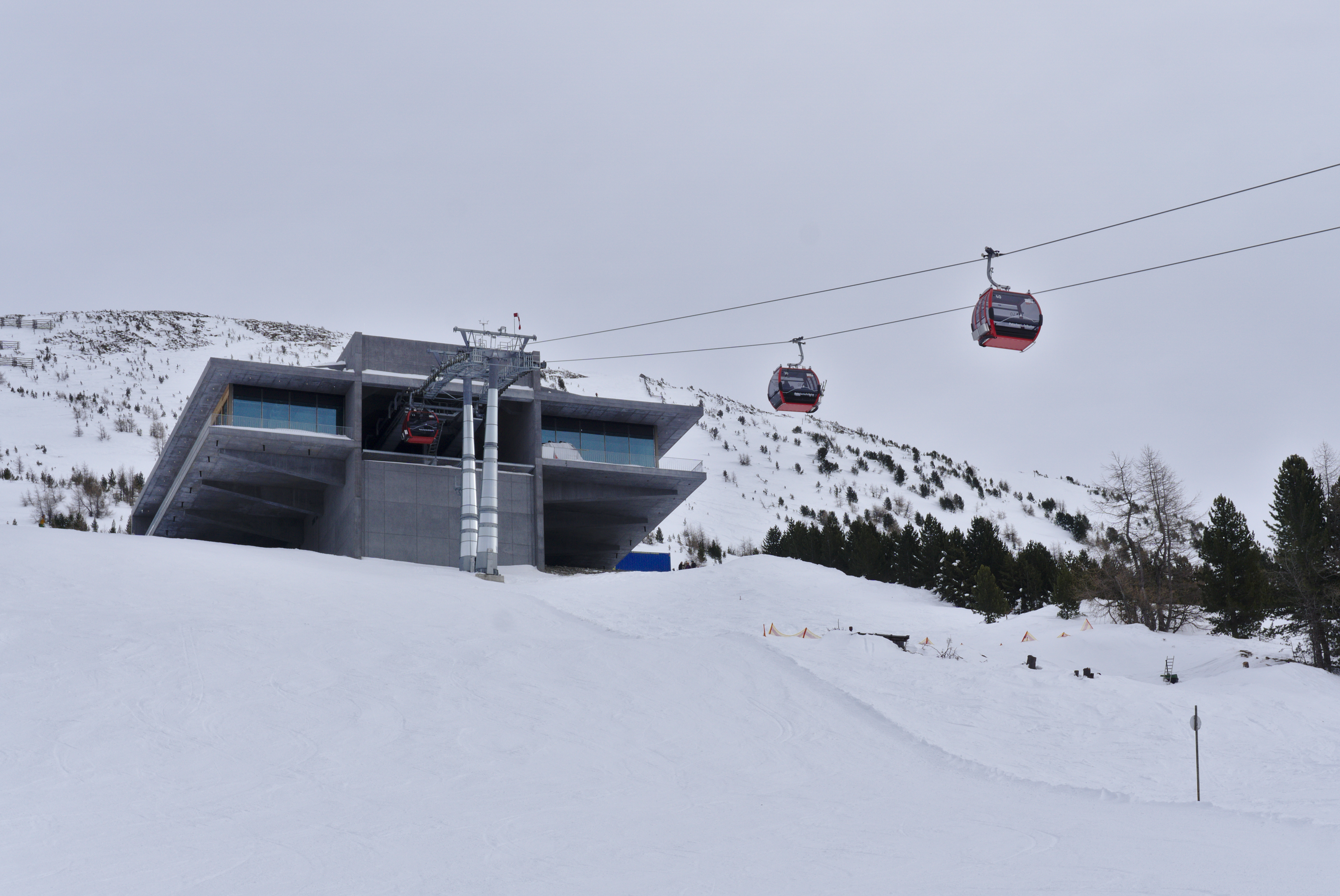 Bergstation der neuen, seit 2017-12 betriebenen Patscherkofelbahn von unten gesehen